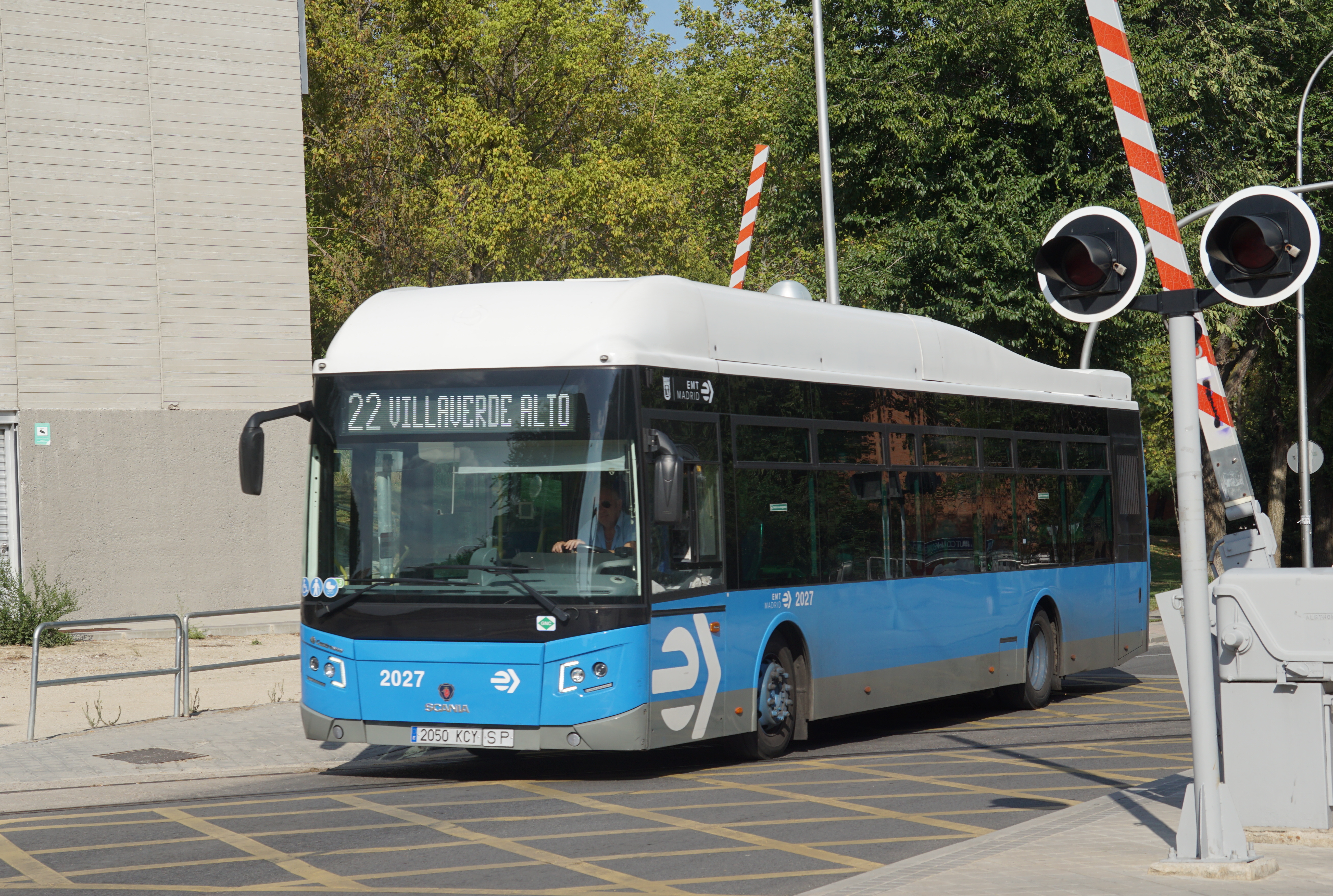 Pasando el paso a nivel de la calle Alcocer, agosto 2020